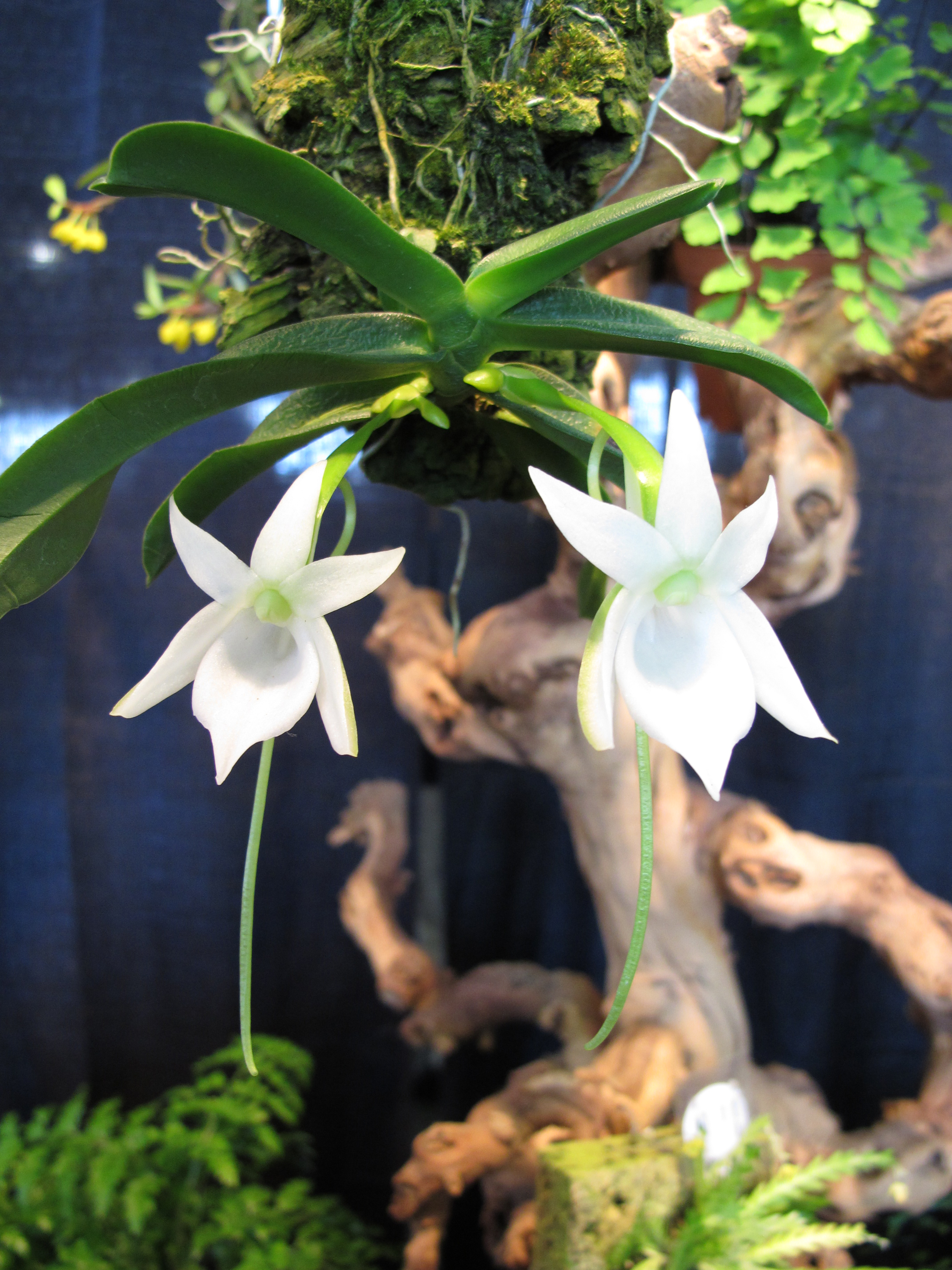 Angraecum compactum Pacific Orchid Exposition, San Francisco, CA.